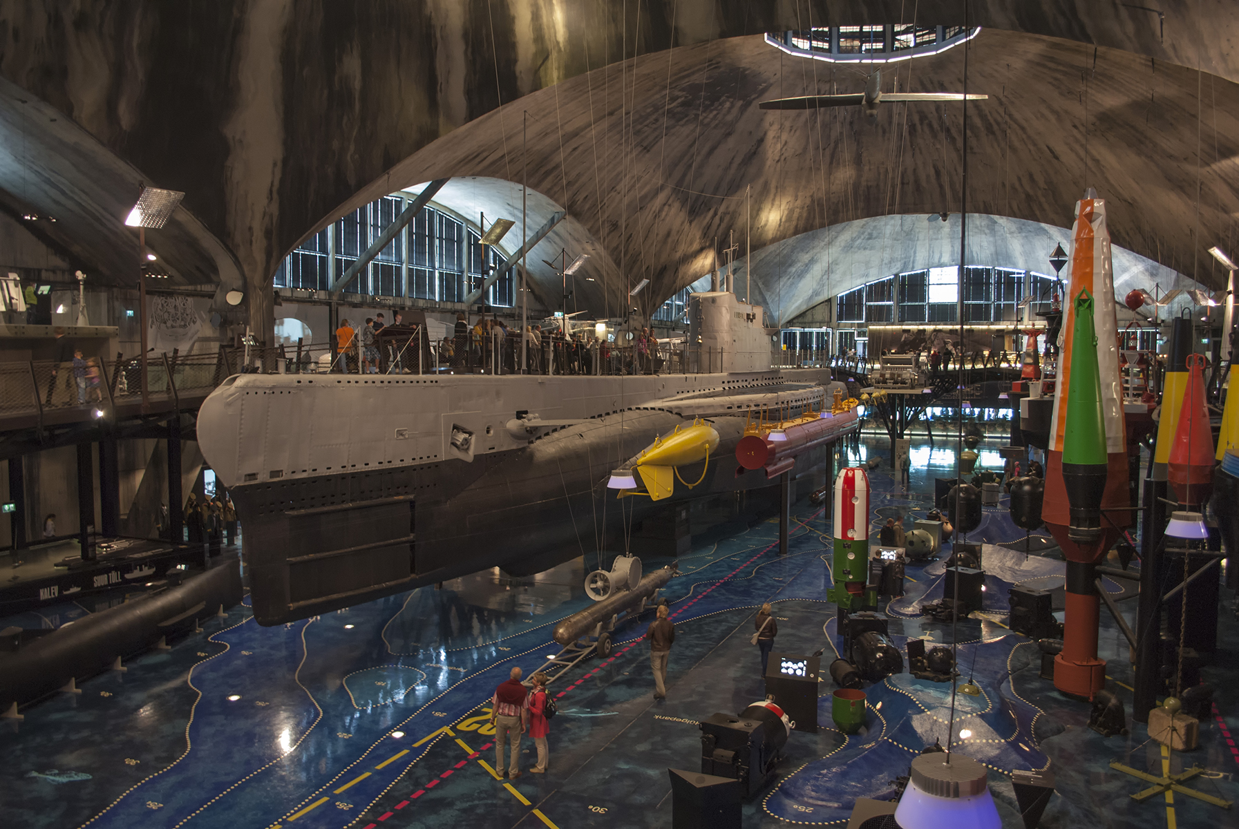 Lembit в ангарах для гидросамолётов в Таллине 19 мая 2012 года